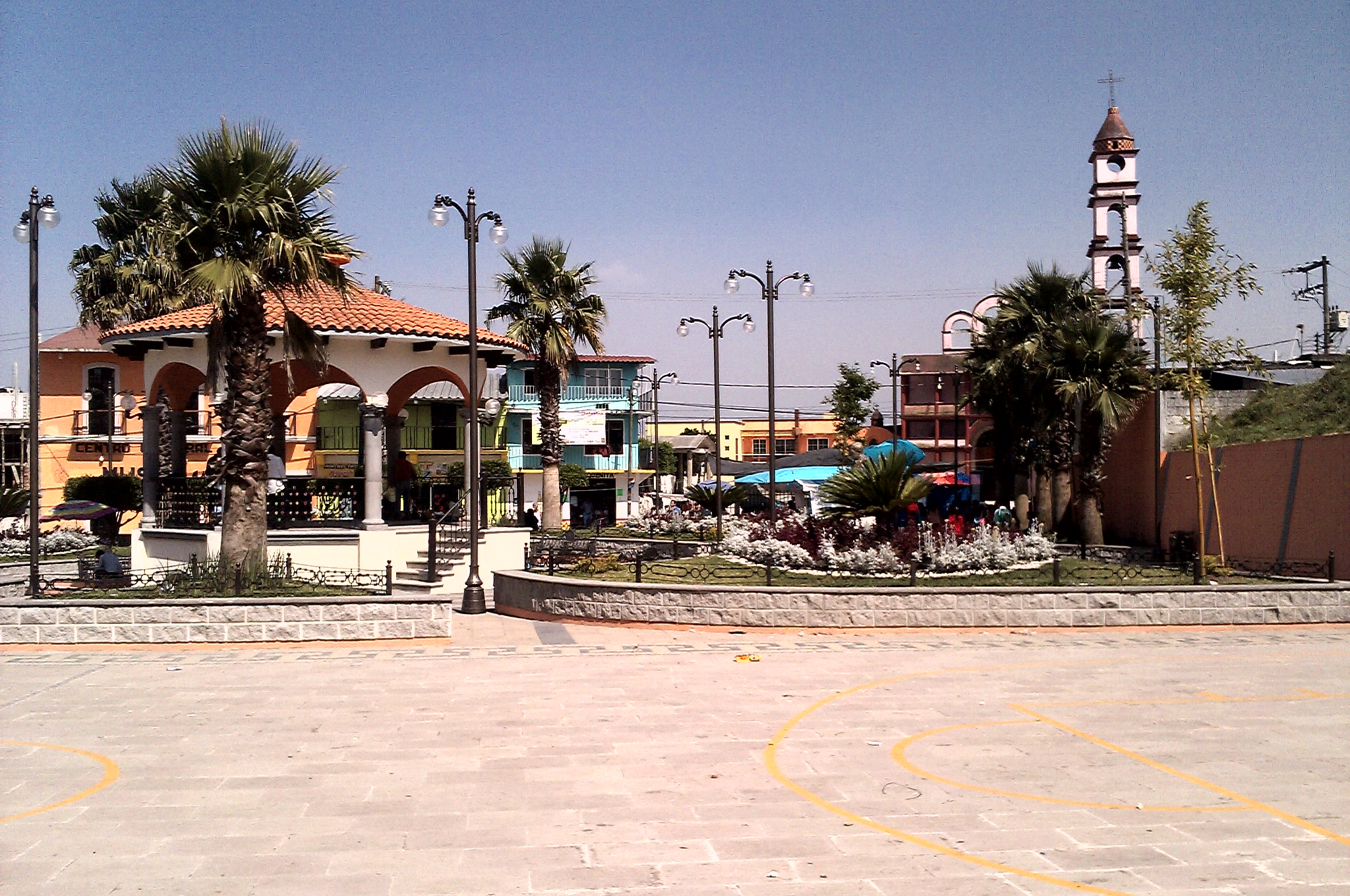 parque remodelado